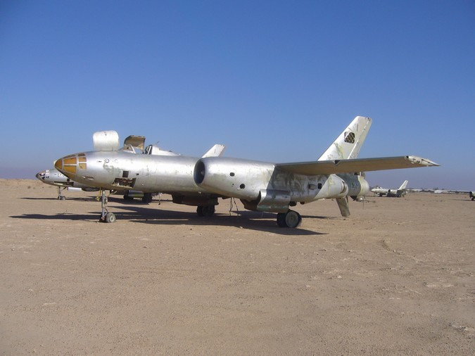 An Iraqi Il-28 bomber junked at Al Taqaddum, Iraq.